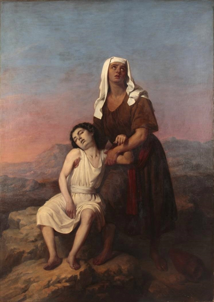 La obra representa a Ismael, el hijo primogénito del patriarca Abraham, y a su madre Agar, en el desierto, después de que Abraham los despidiera a ambos.